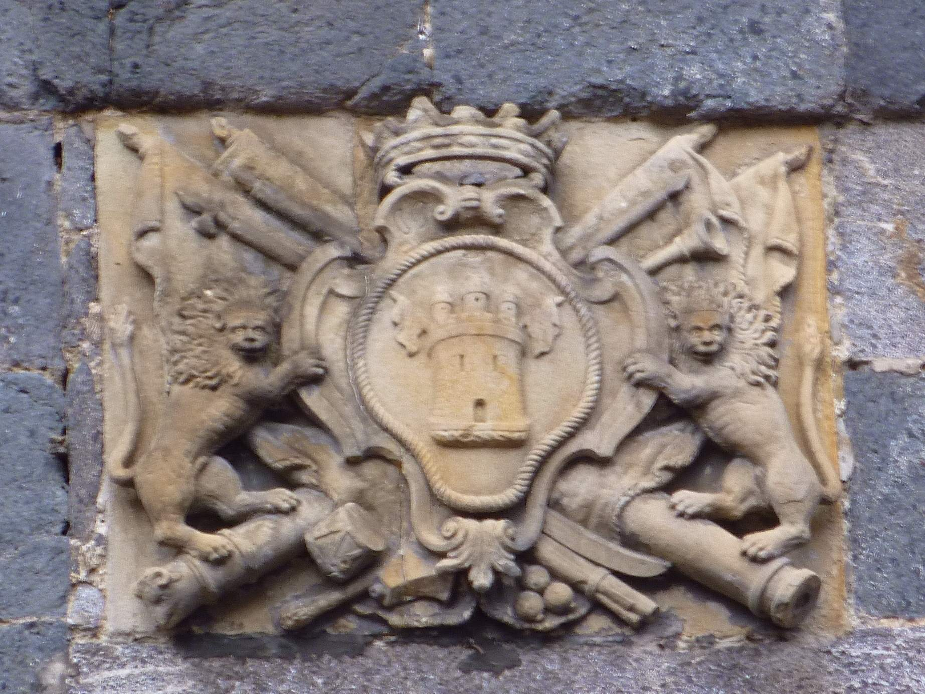 Ayuntamiento de Soraluze